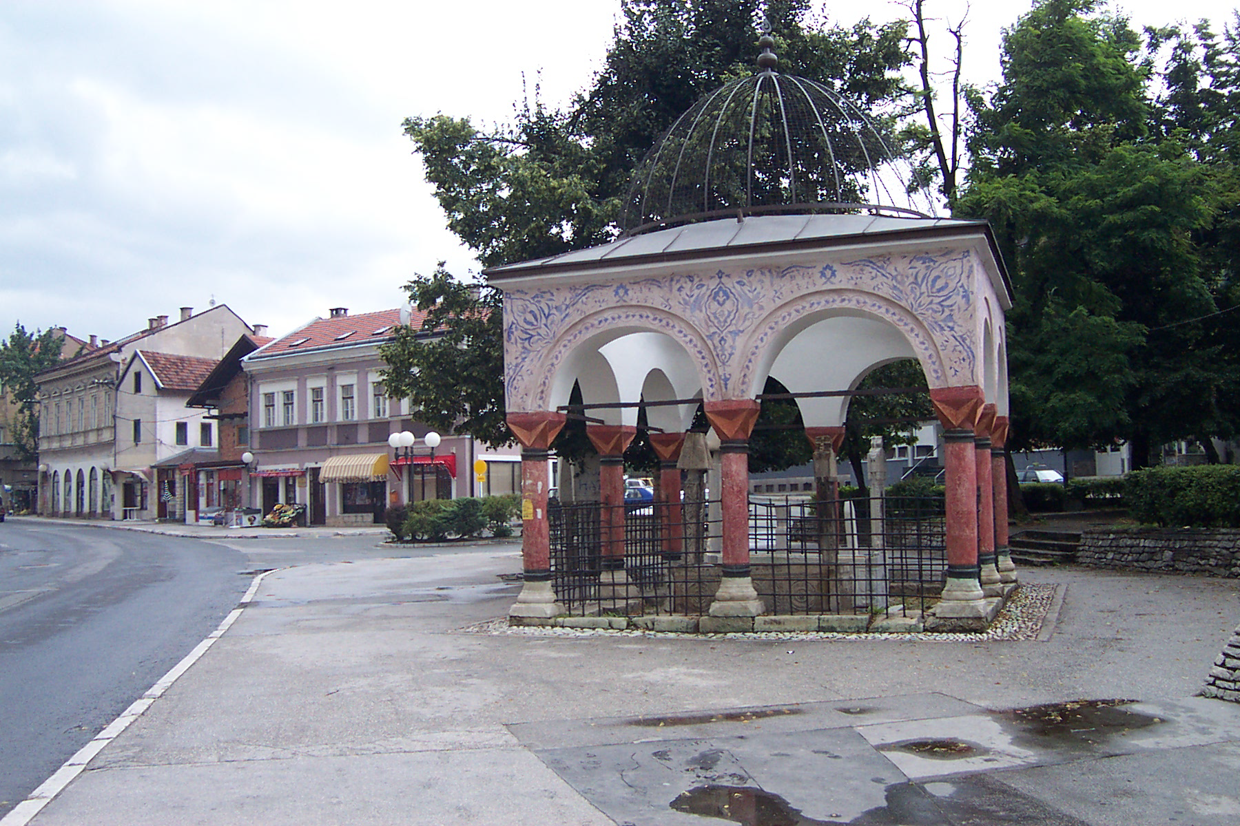 Bogomil shrine Monuments in Travnik, Bosnia